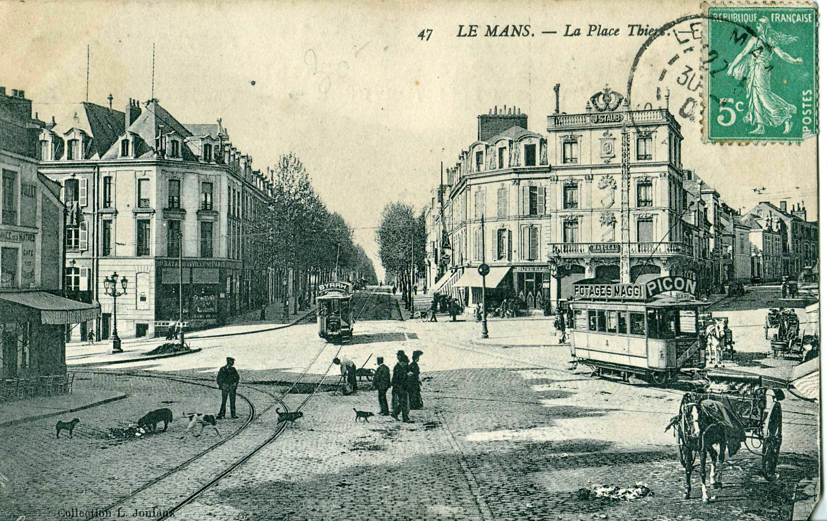 Carte postale ancienne éditée par L. Joniaux, n°47 : Le Mans - La Place Thiers Vue de deux rames du tramway du Mans